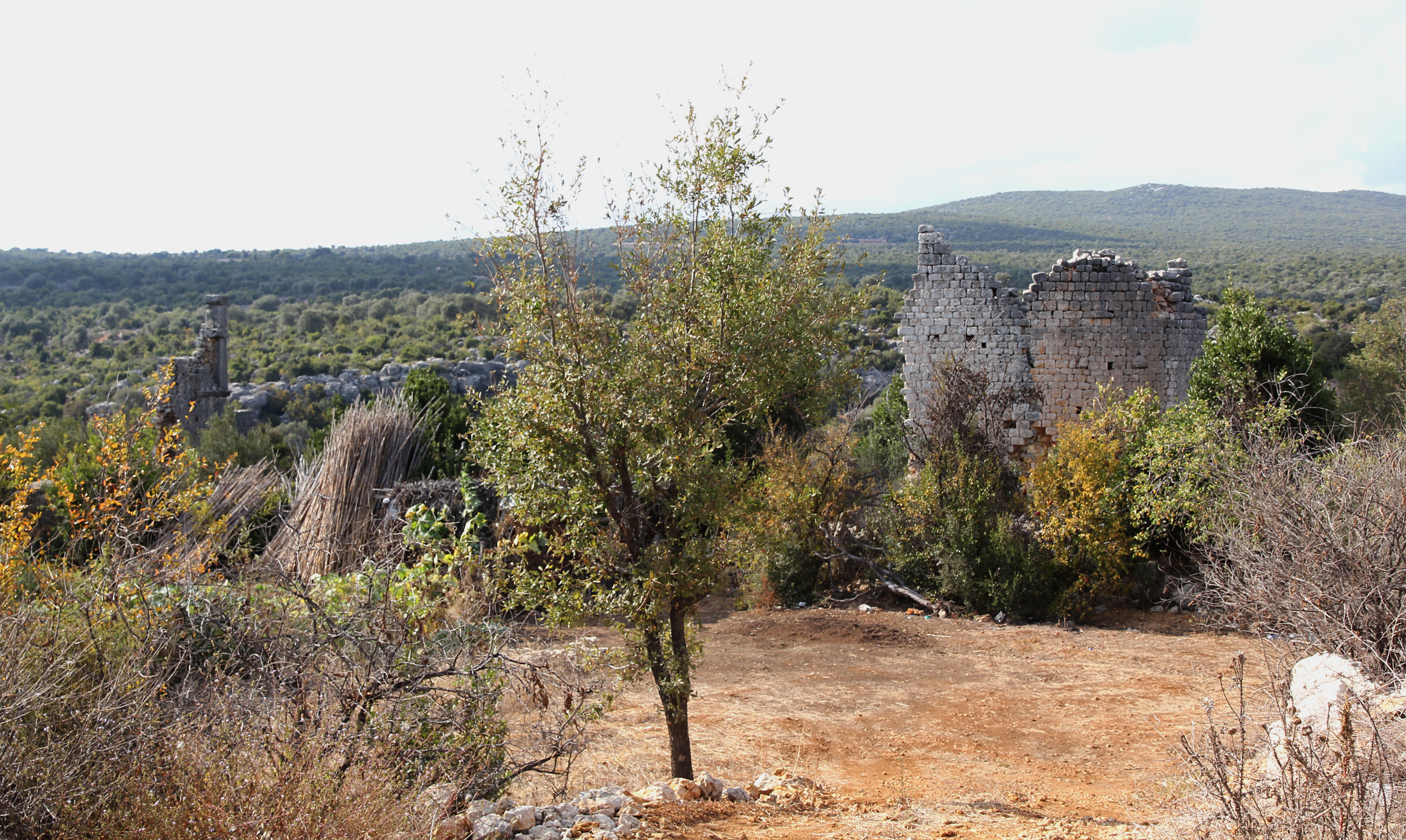 Emirzeli, byzantinische Kleinstadt im Rauhen Kilikien, Südtürkei, Kirche I von Süden